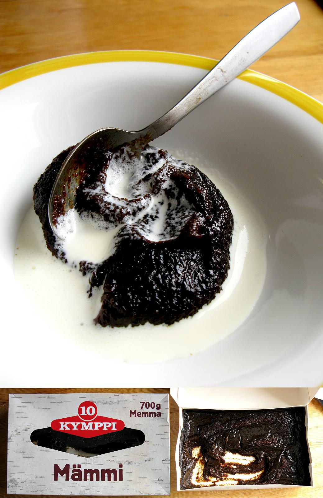 Mämmi